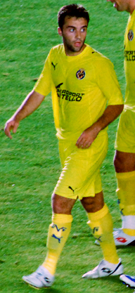 El Vila-real celebrant un gol, en un amistós en pretemporada davant el Nàstic.